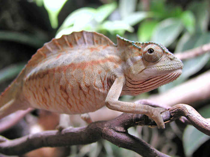 Chamaeleo cristatus, Male, Kamerun